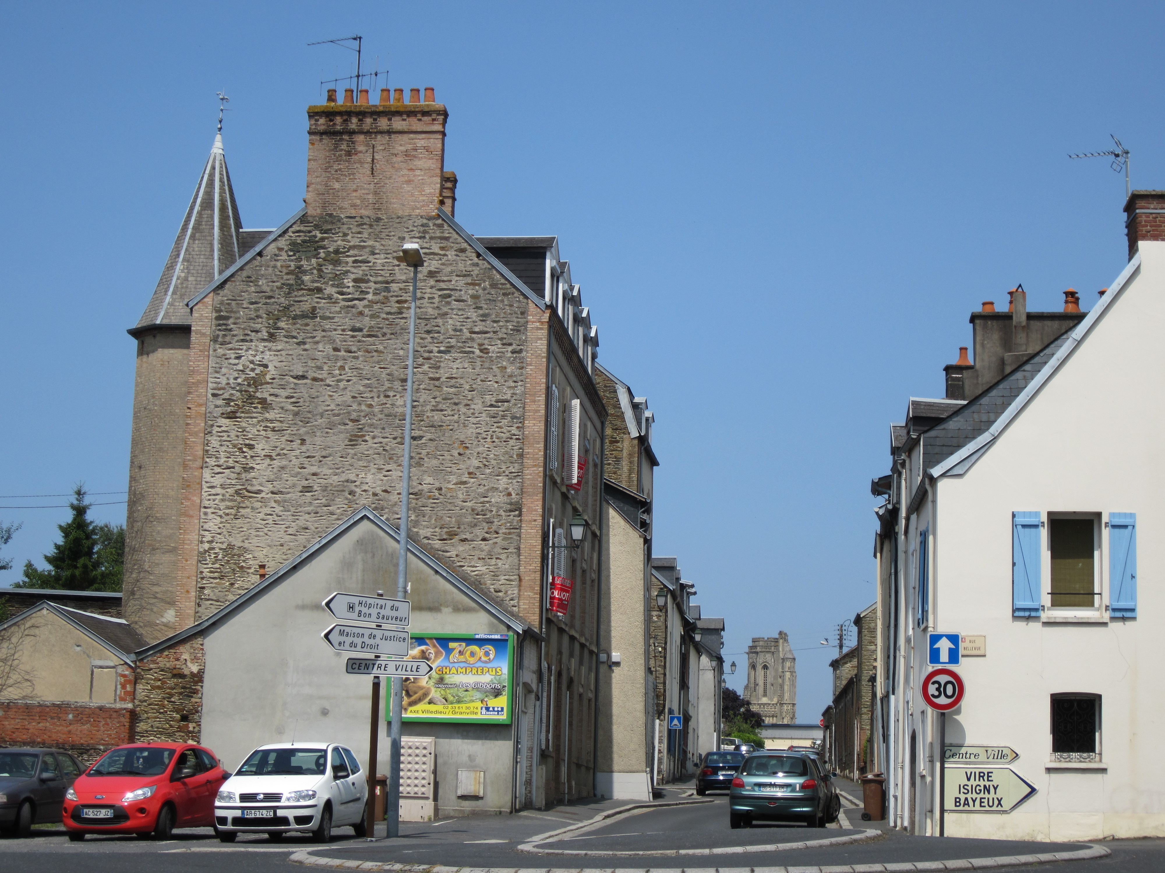 Saint-Lô